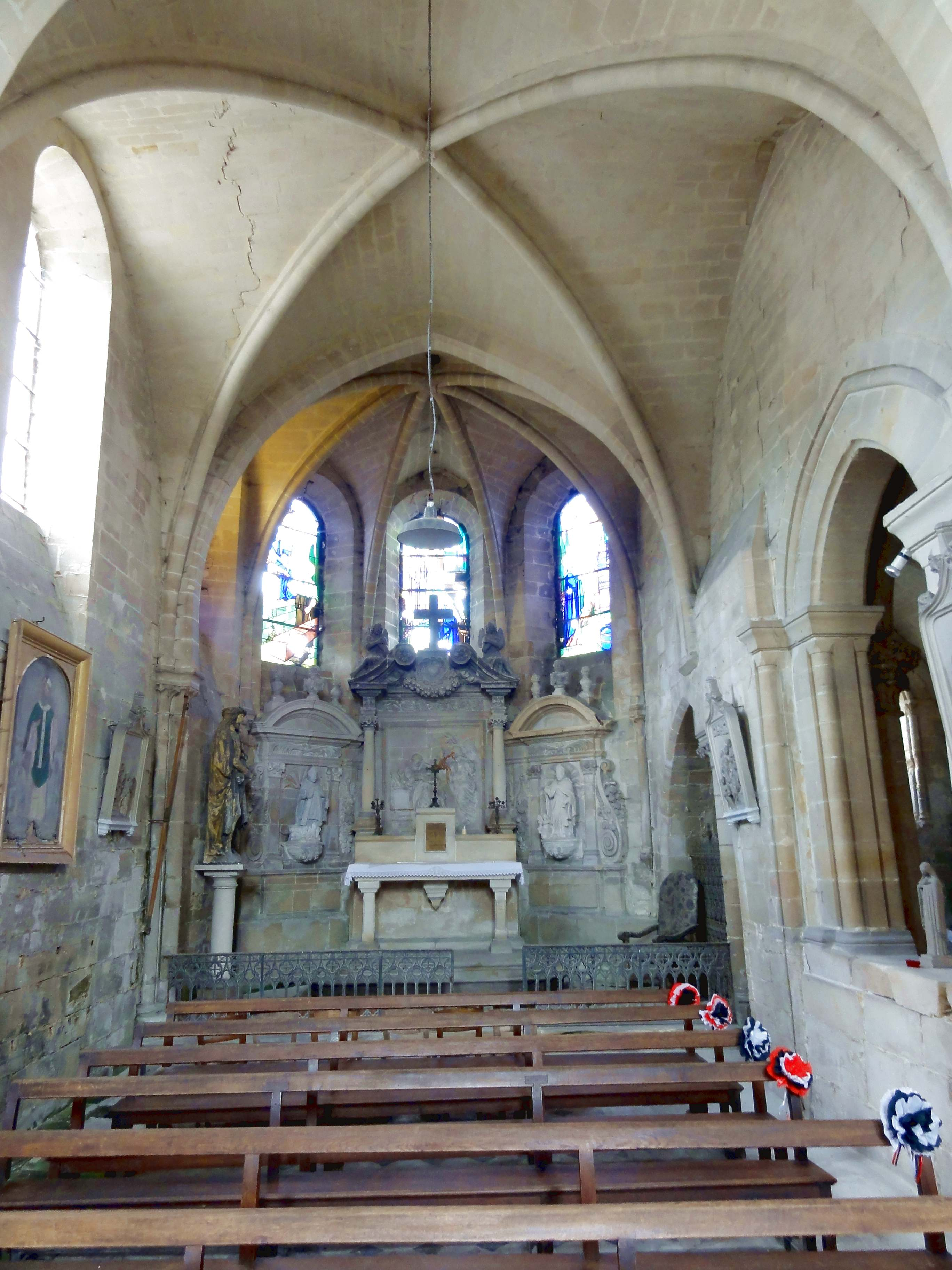 Intérieur de l'église (voir titre).